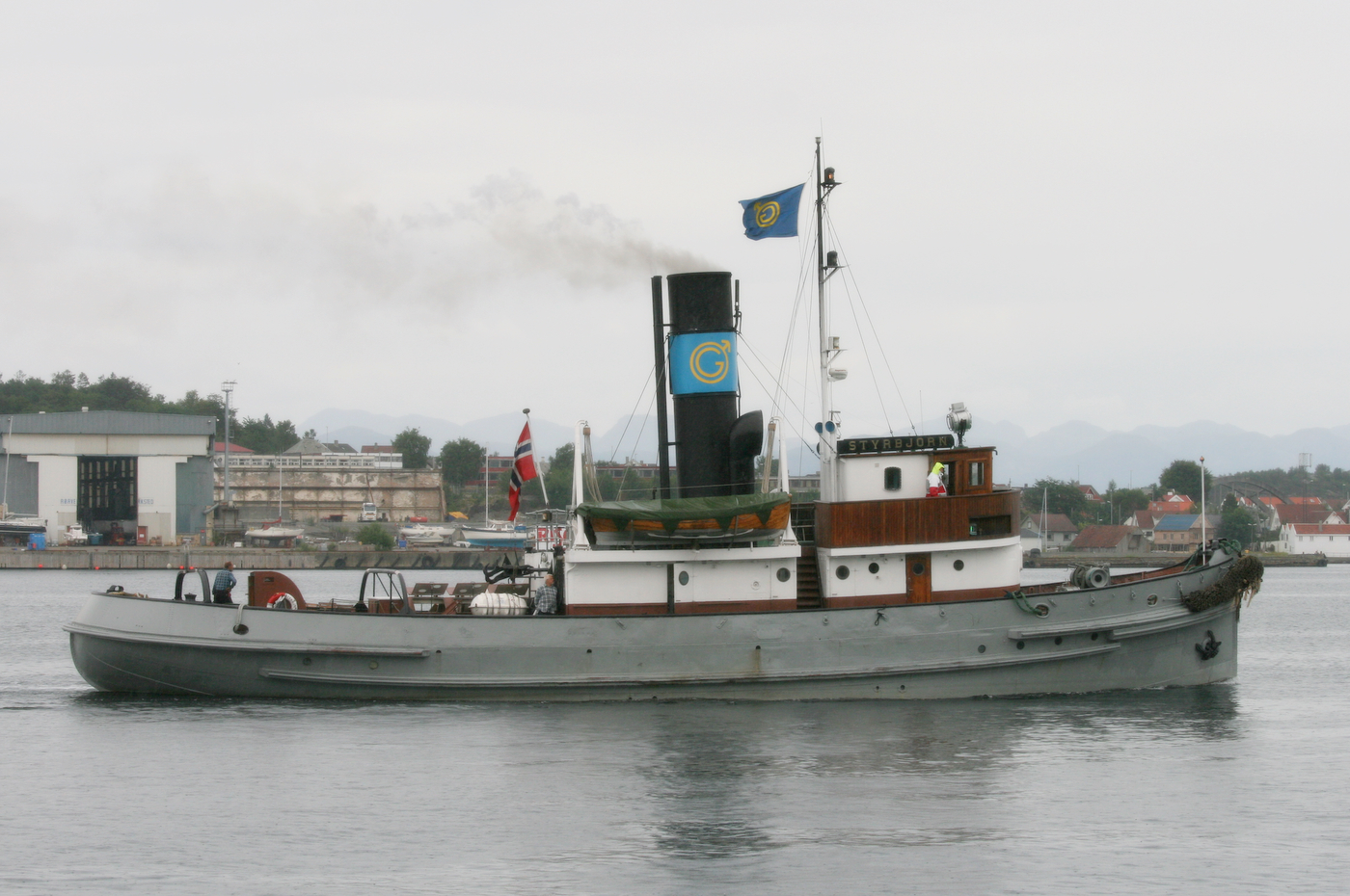 D/S «Styrbjørn» in Stavanger